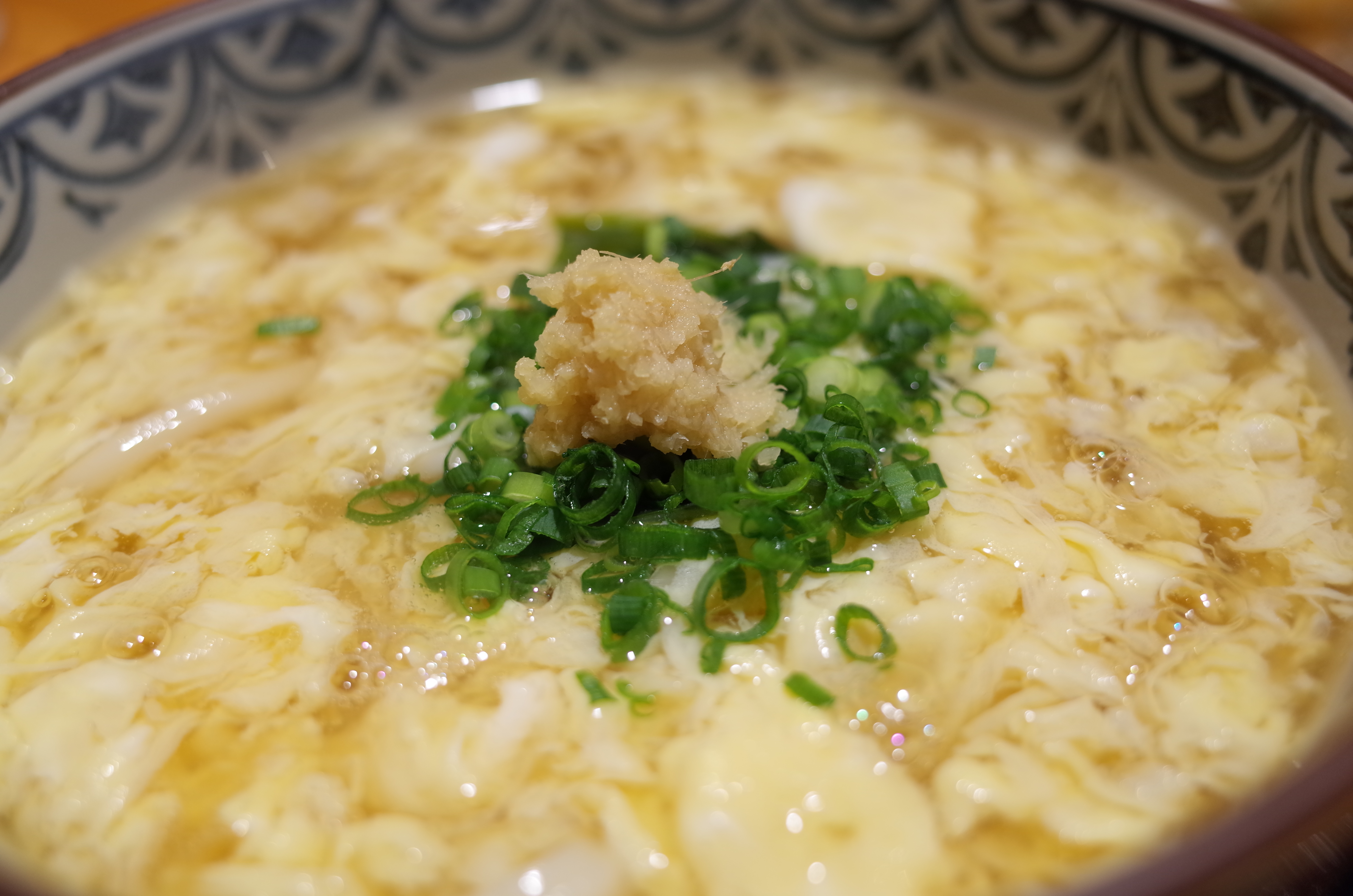 Egg drop soup